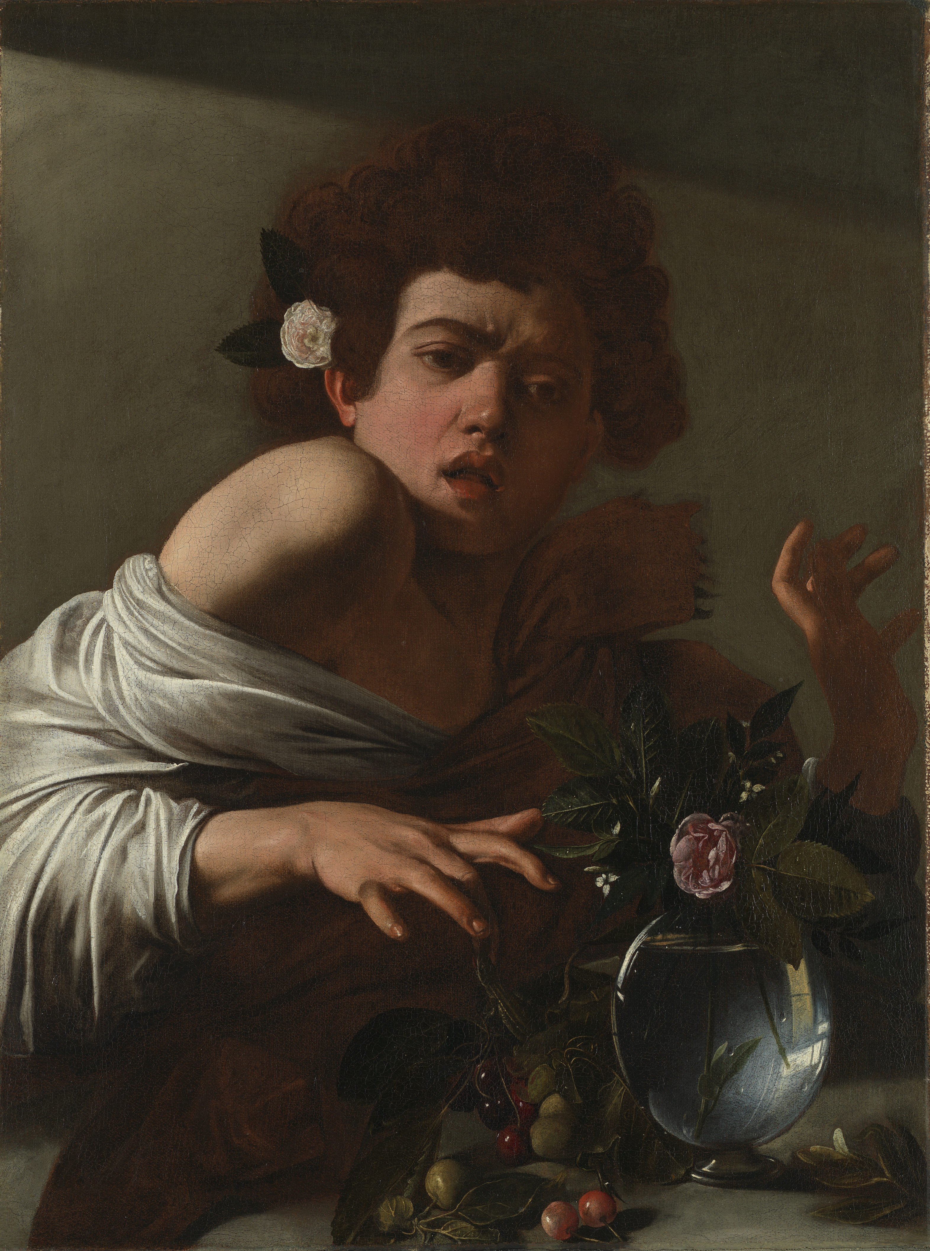 Мальчик, укушенный ящерицей